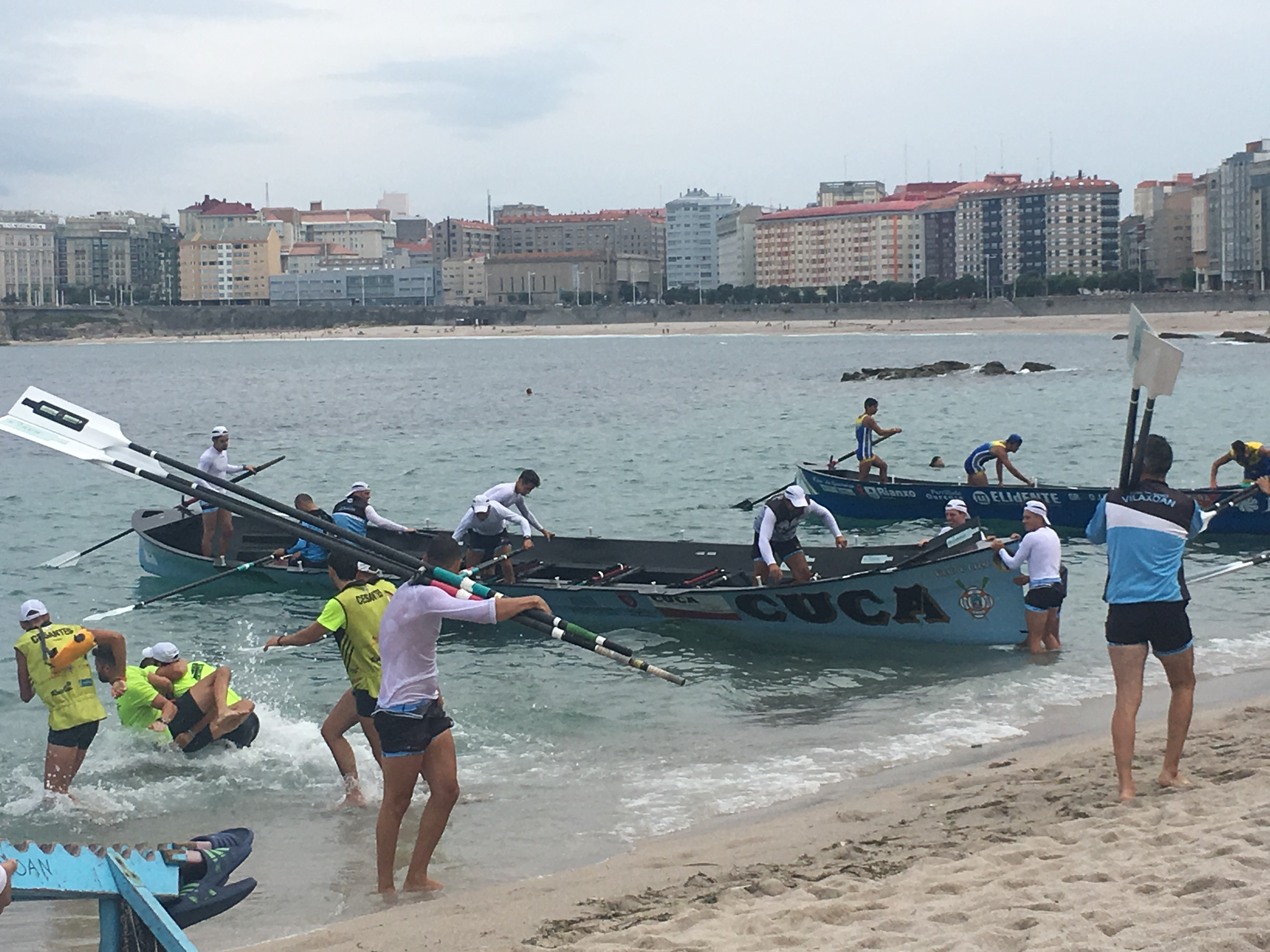 Traiñeira de Vilaxoán na Bandeira Teresa Herrera da Coruña en 2019.